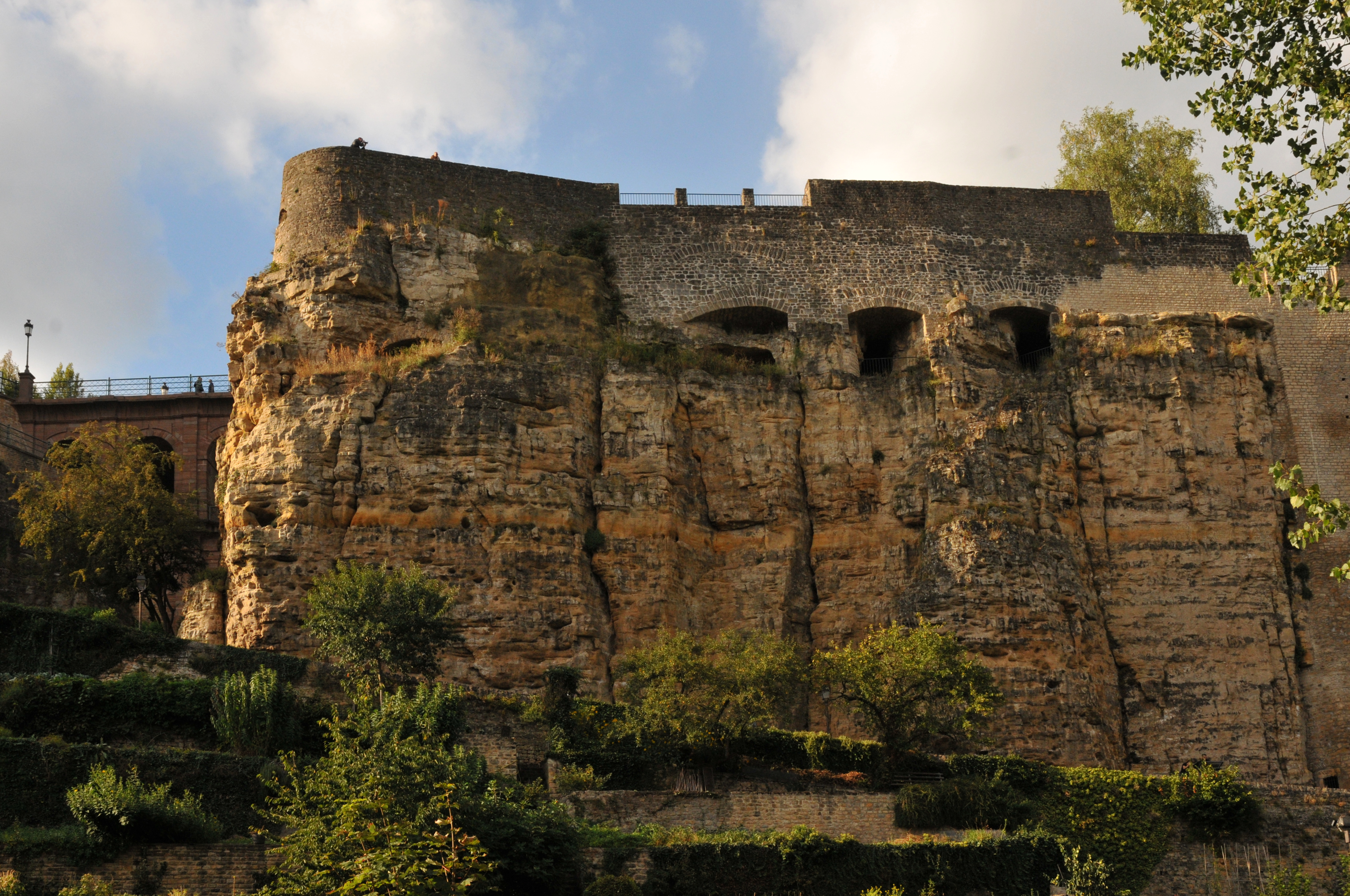 De Bockfiels, mat lénks der Schlassbréck, vun der Neimënsterabtei aus gesinn.